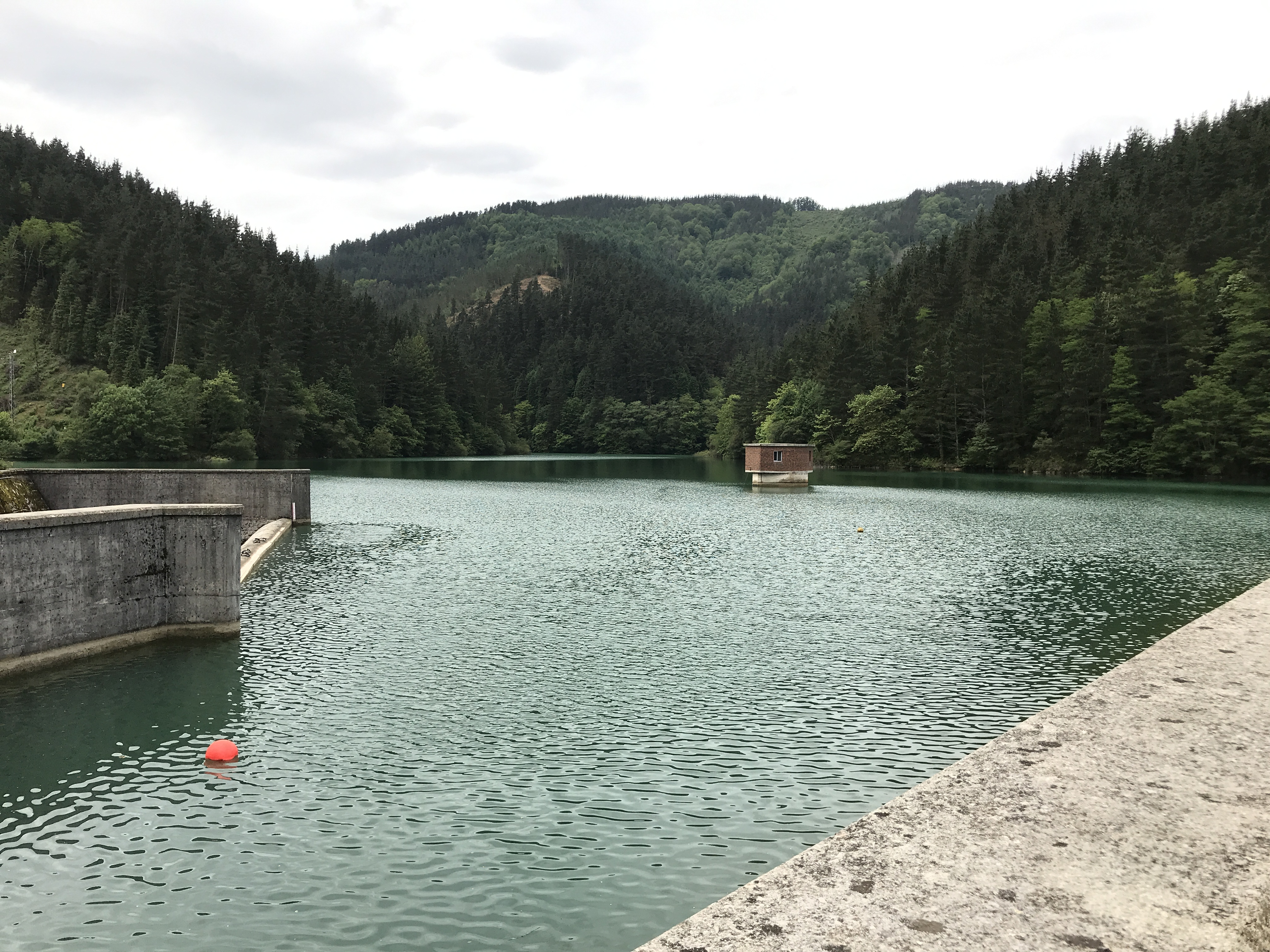 Vista parcial del embalse de Aixola en situado en el término municipal de la localidad guipuzcoana de Elgueta (País Vasco, España) que represa el río Aixola, perteneciente a la cuenca del Deva, formando un embalse destinado al consumo de agua potable.